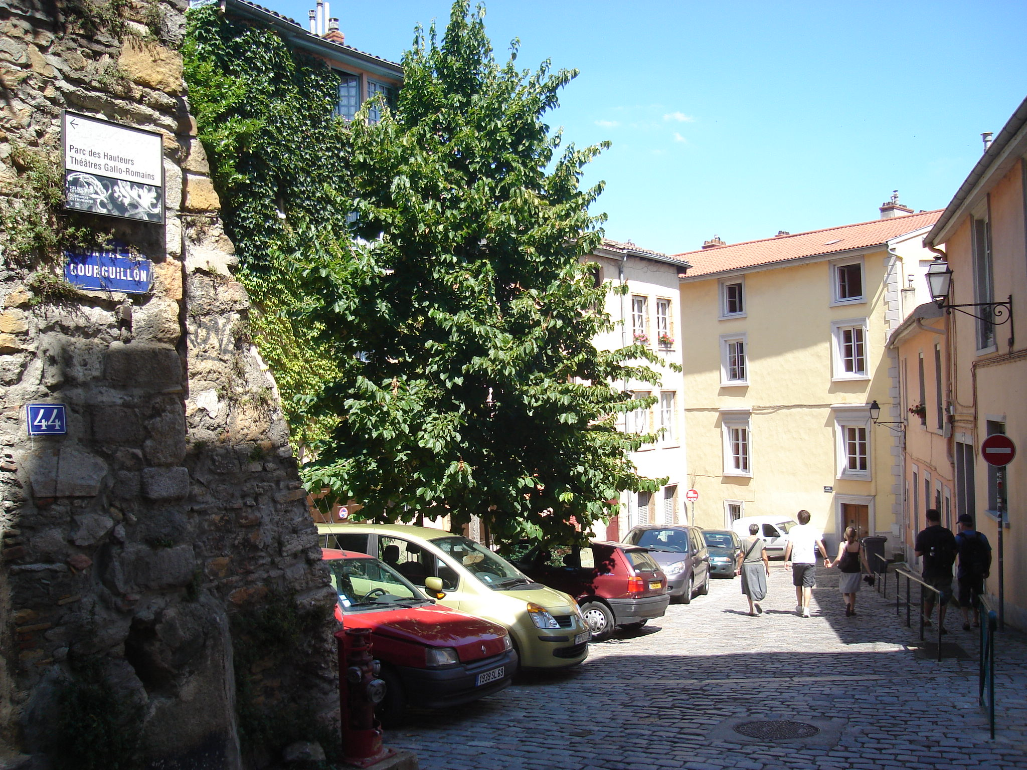 Montée du Gourguillon, Lyon